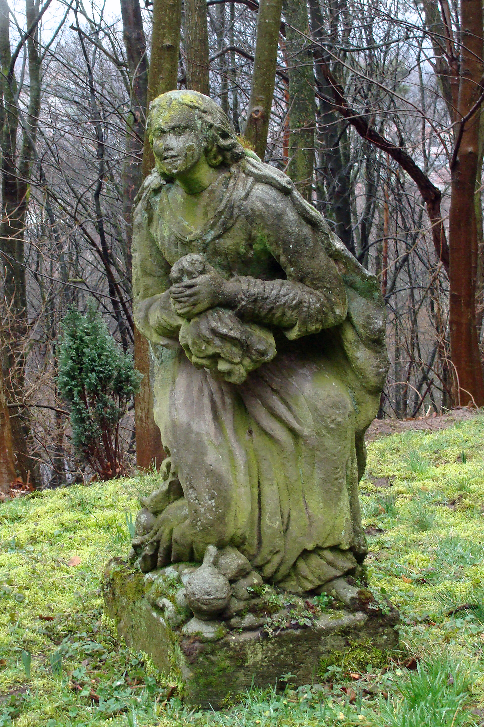 Sculpture de Marie-Madeleine, chapelle Sainte-Croix de Forbach